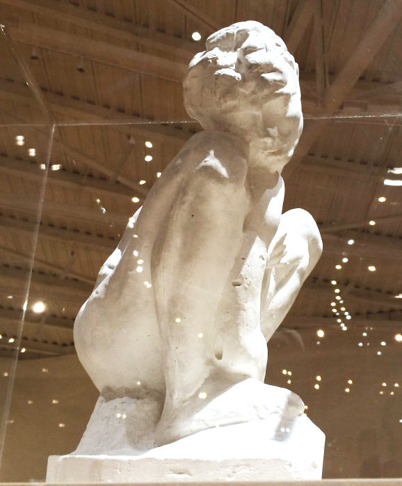 Mujer en cuclillas de Auguste Rodin.